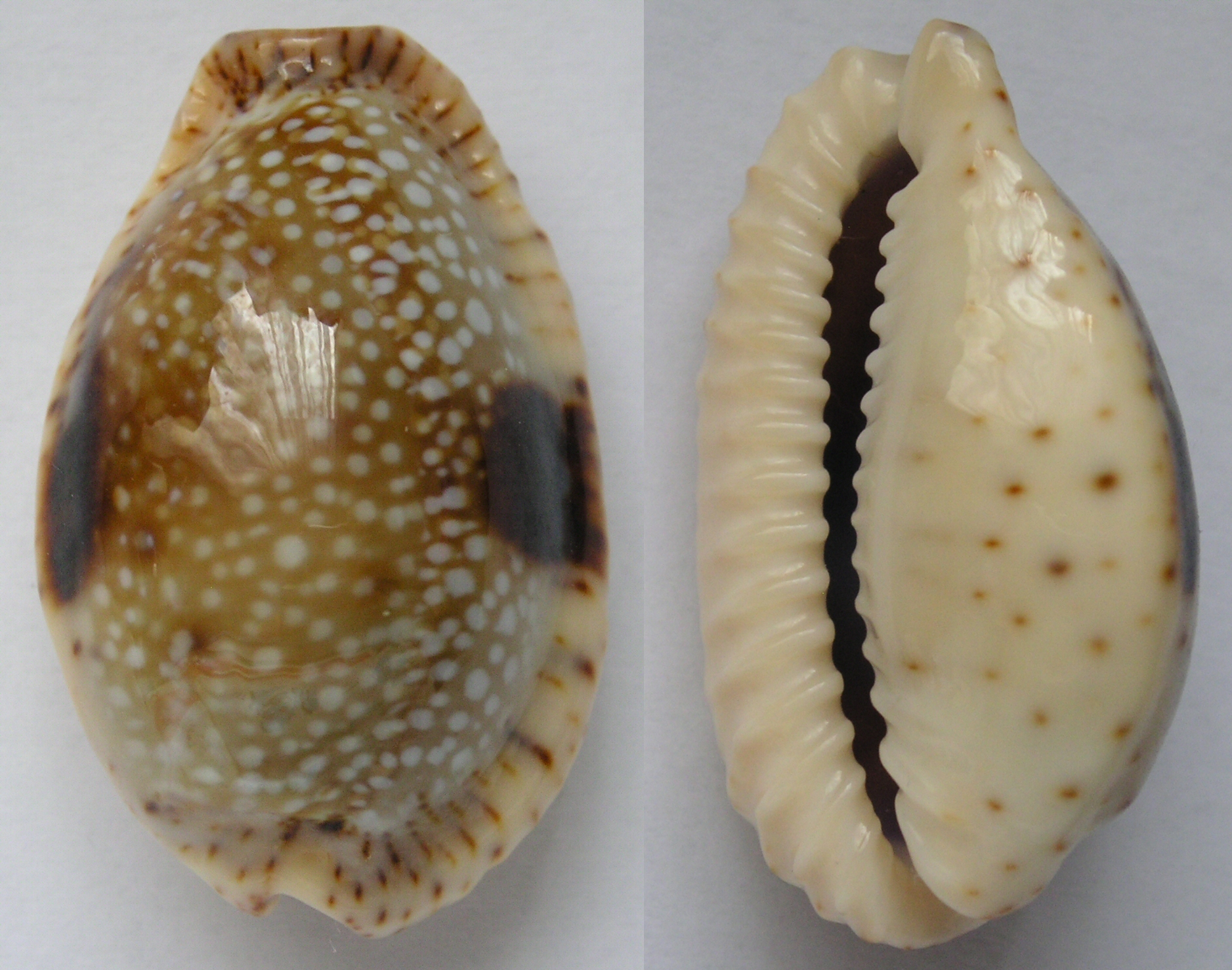 Erosaria nebrites (synonym : Cypraea nebrites)